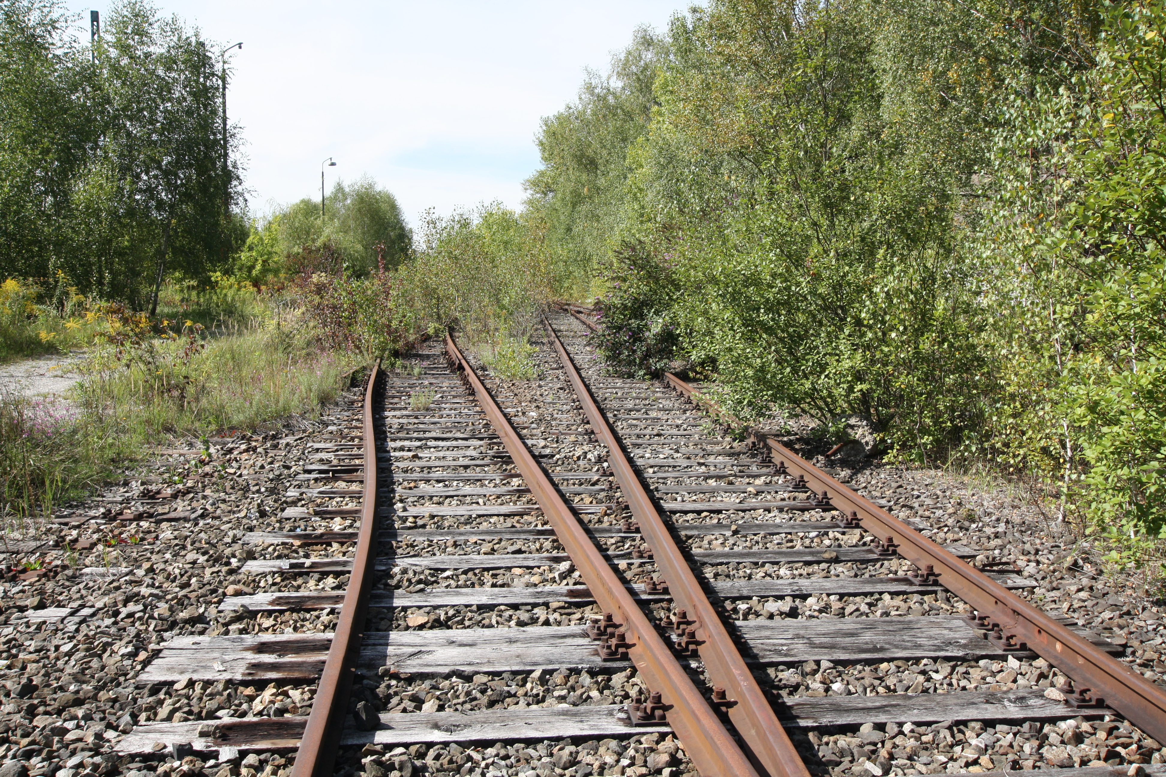 ehemaliges Betriebswerk München 4, Berg am Laim